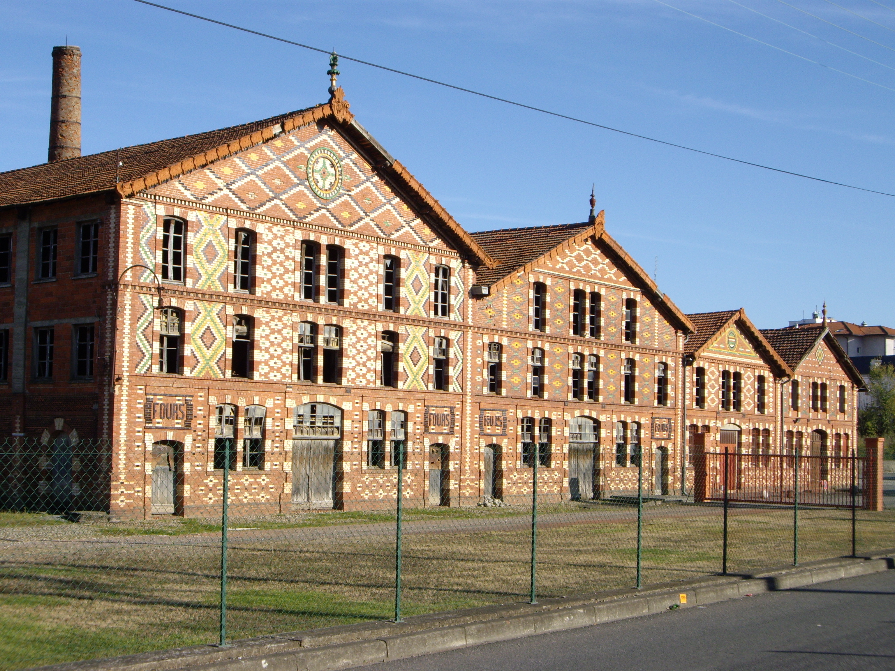 Fàbrica blanca i fàbrica roja Oustau